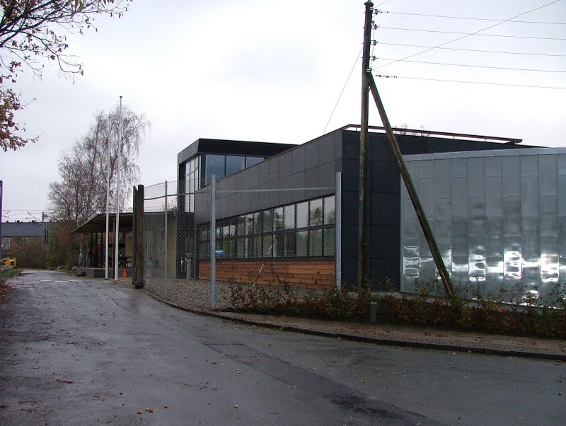 Jægersborg Boldklub's klubhus